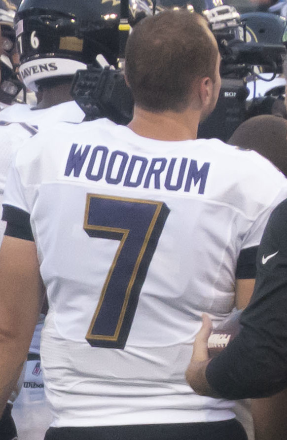 Redskins at Ravens 08/30/18